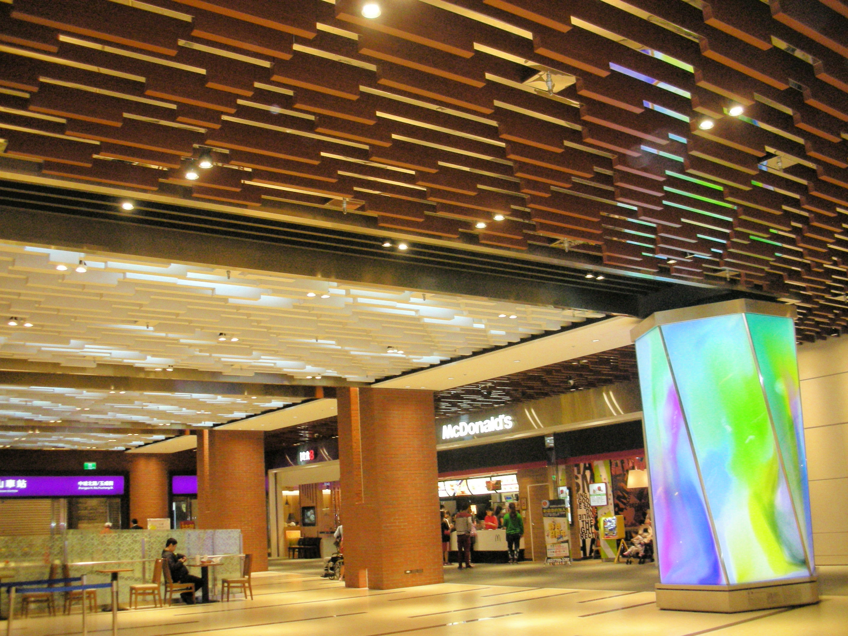 松山車站 CITY LINK